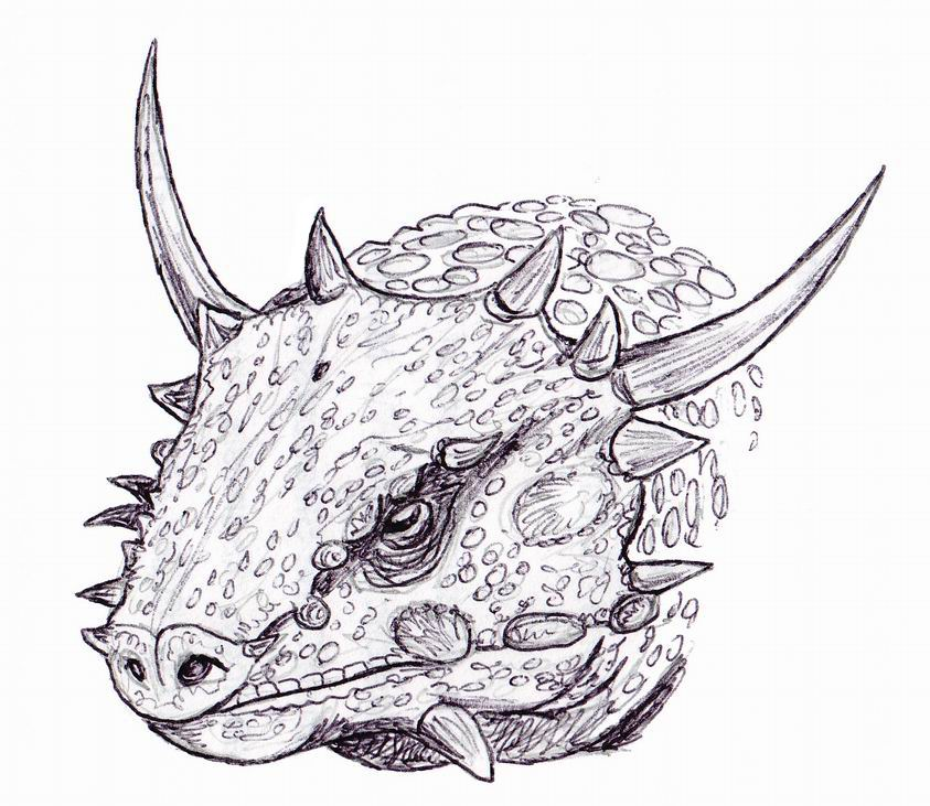 Permission